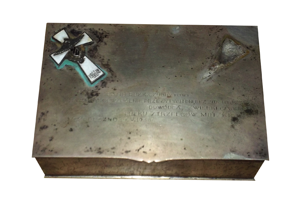 Szkatuła za służbę w 86 pp